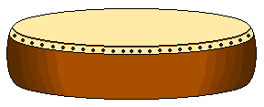 הירה דאיקו - תוף יפני ציור שאני ציירתי והעלתי אסף.צ 16:51, 9 מאי 2005 (UTC)